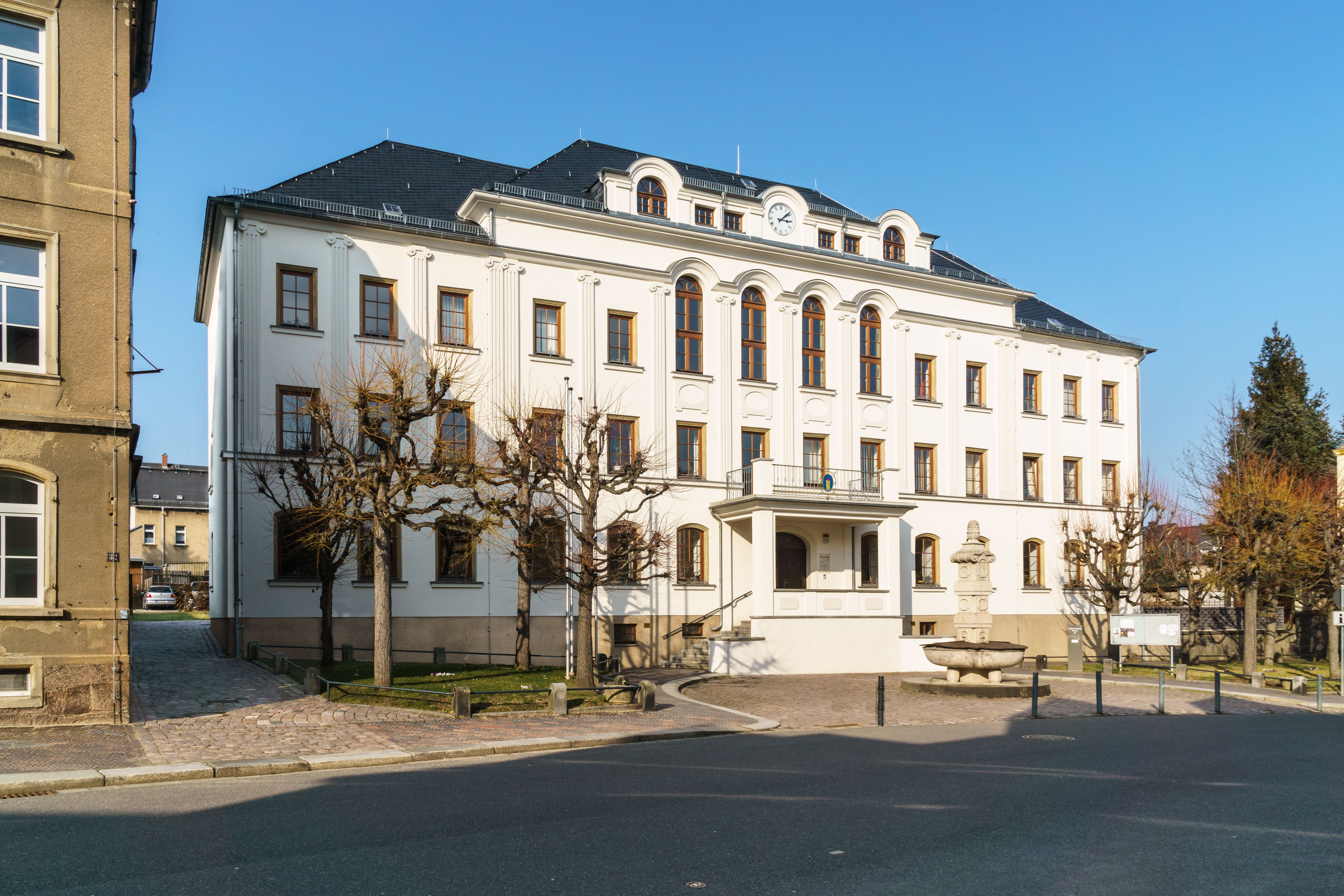 Rathaus Hartha, Karl-Marx-Straße 32 in Hartha